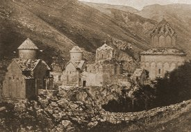 Монастырь Хцконк (Khtzkonk)